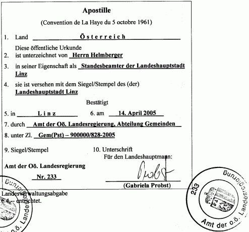 Апостиль (Австрия)